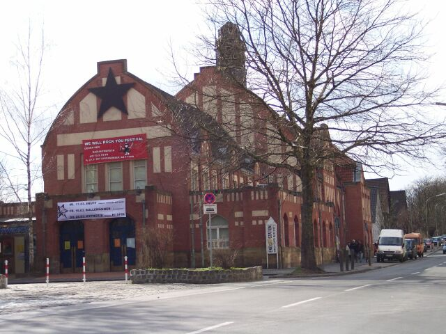 Bild aus Bochum vom Bahnhof Langendreer, selbst aufgenommen, GFDL